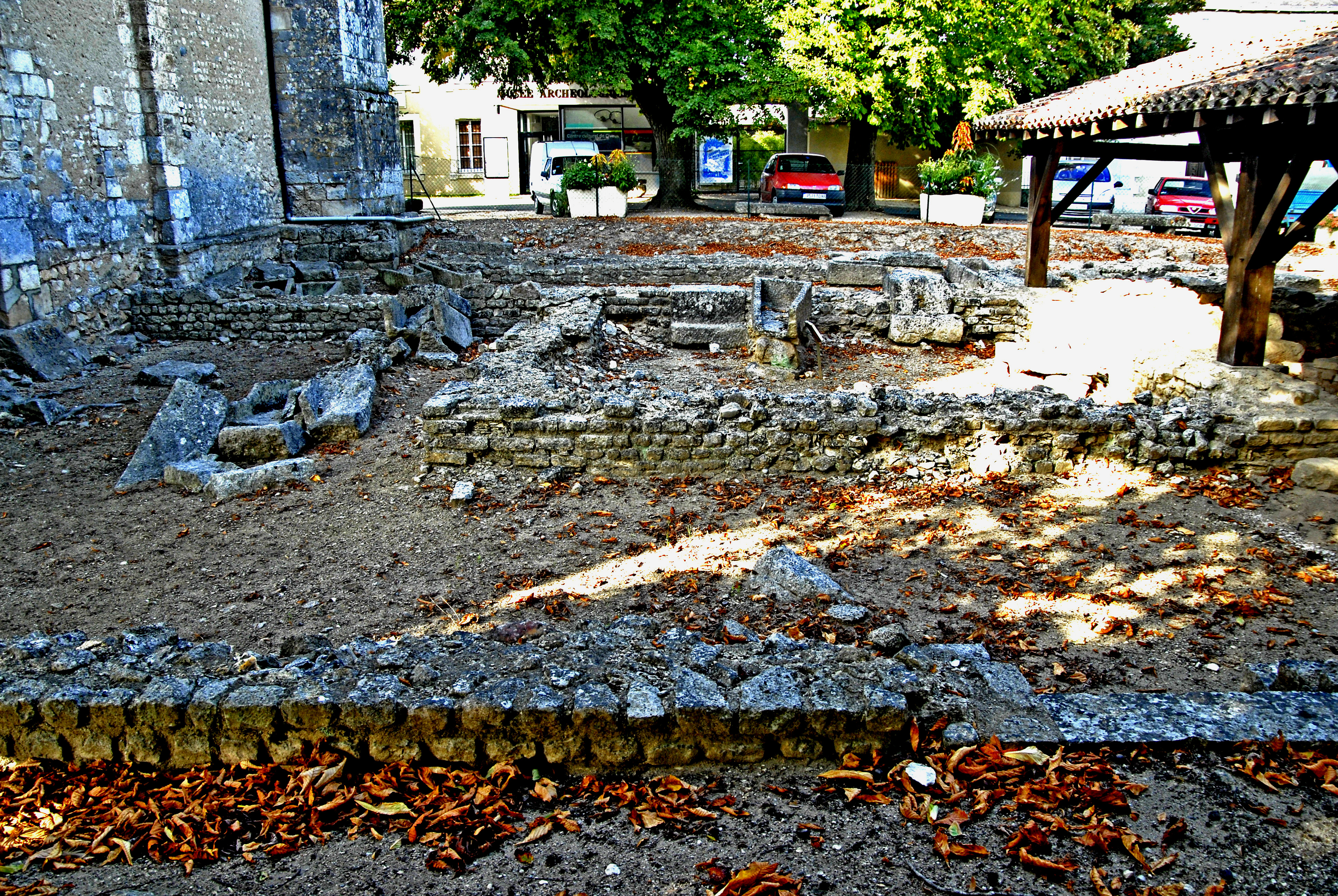 Civaux, Ausgrabungen, Fanum